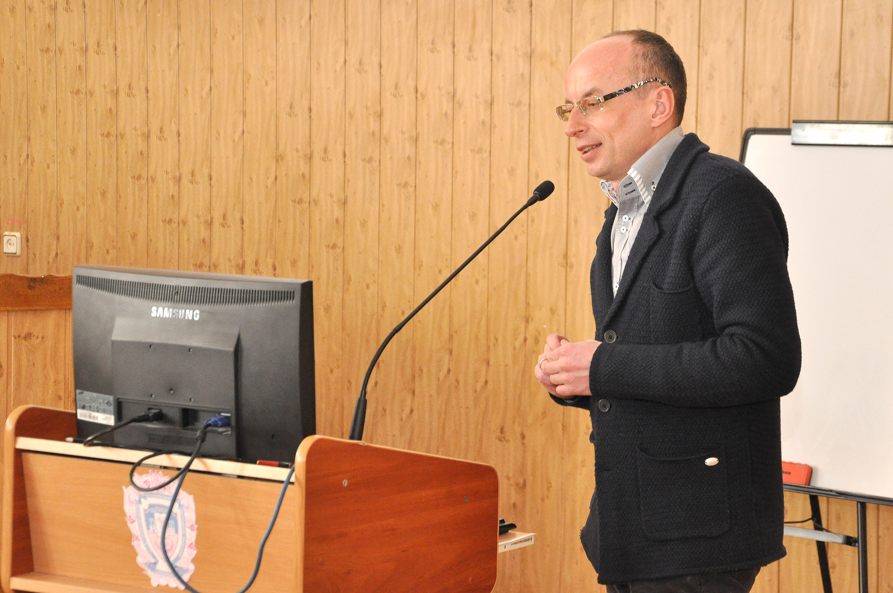 Професор Ігор Господарський виступає з доповіддю на науково-практичній конференції з міжнародною участю «Медико-соціальні проблеми дитячого віку», яка проходила в Тернопільському державному медичному університеті імені І. Я. Горбачевського 26-27 березня 2015 року.